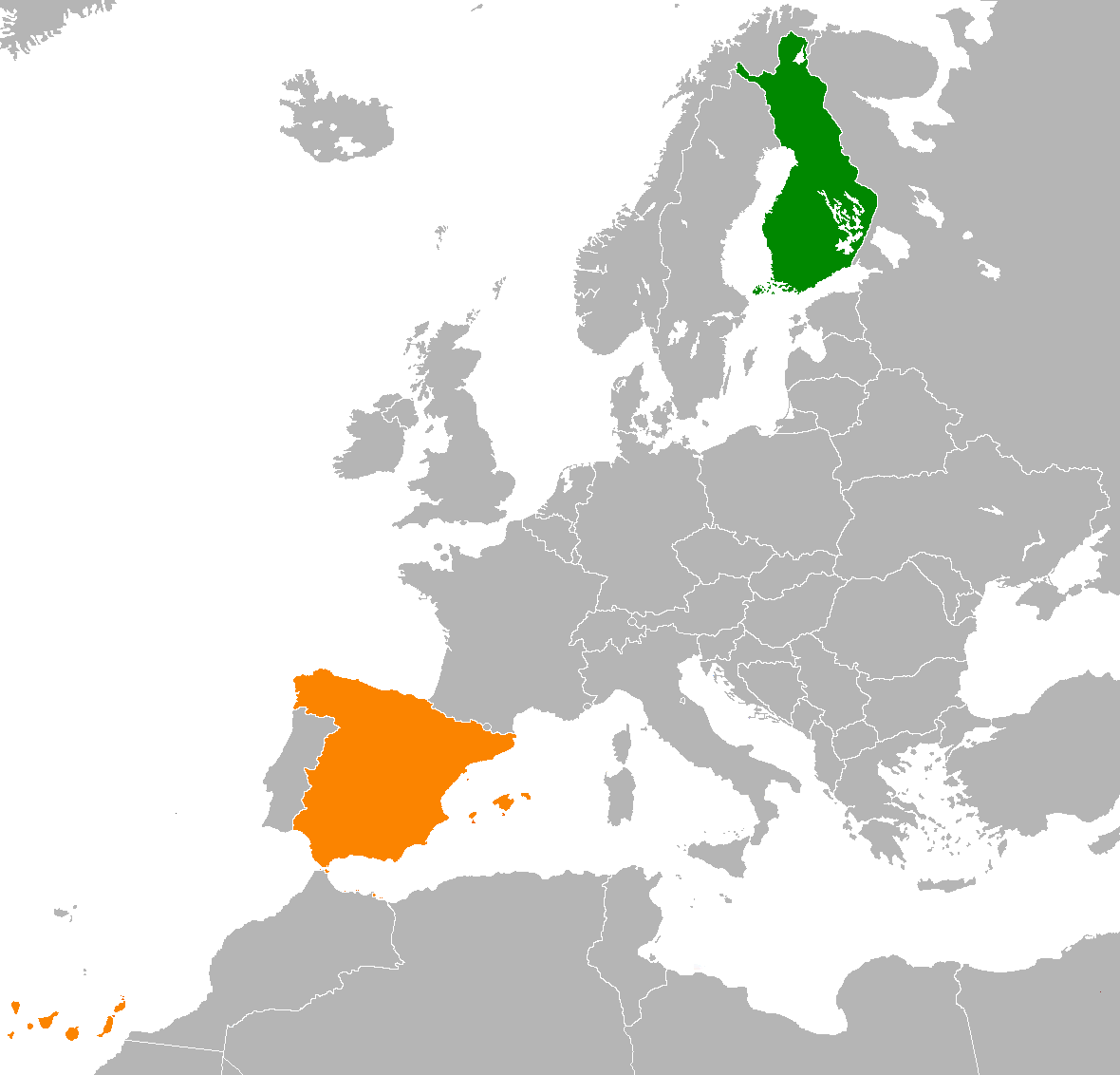 Localización de España y Finlandia